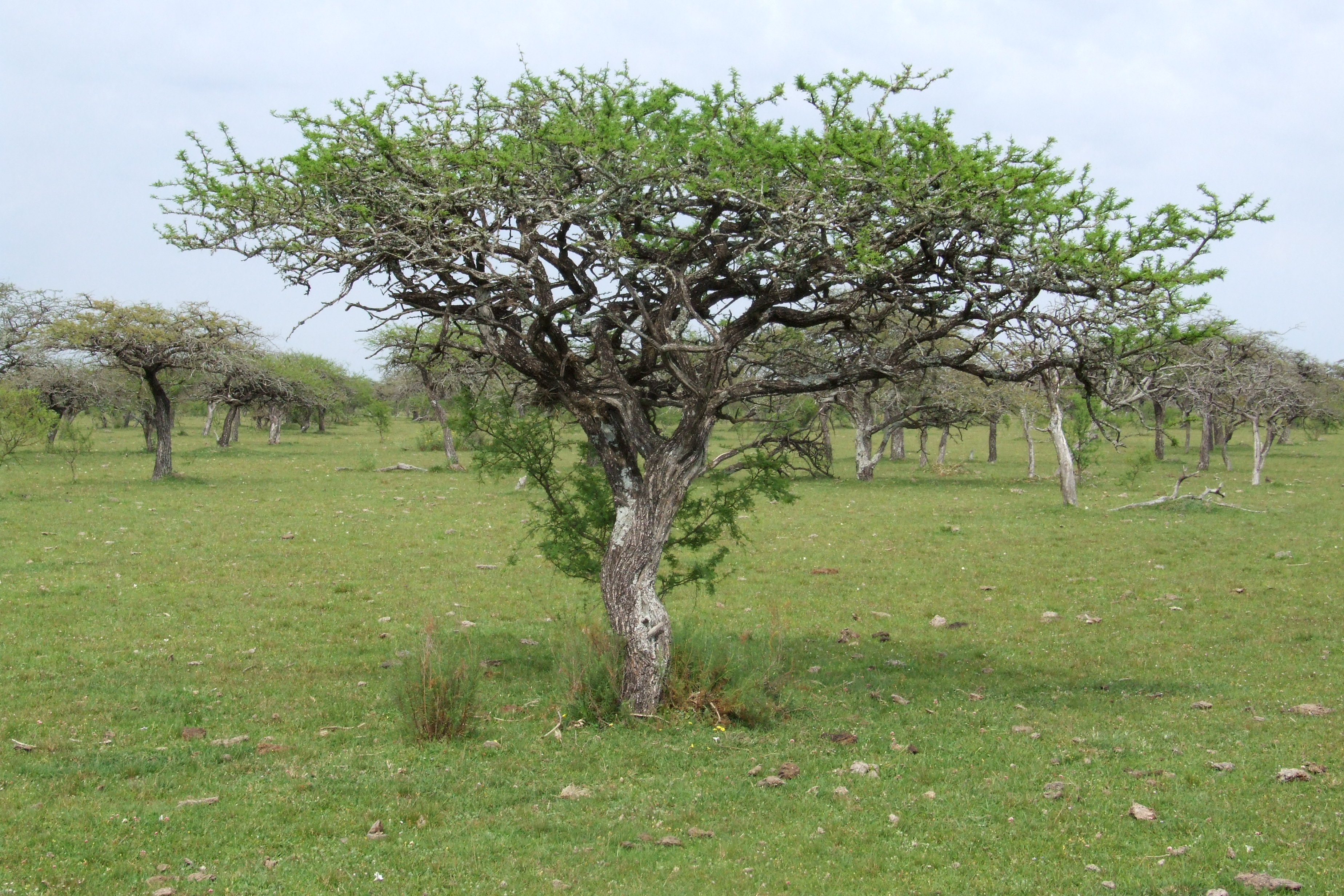 Parque Estadual do Espinilho